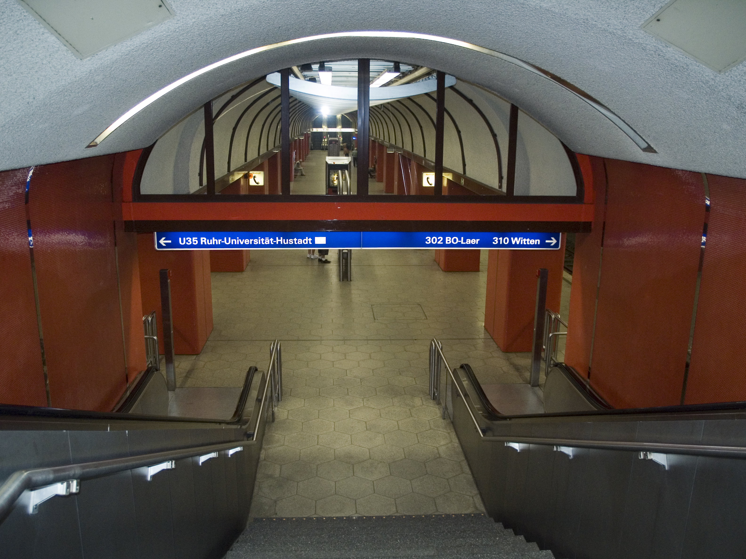 Северный рейн - Вестфалия. Бохумский скоростной трамвай - станция Hauptbahnhof